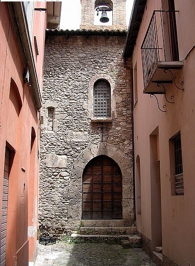 Chiesa di Santa Caterina - Teramo.